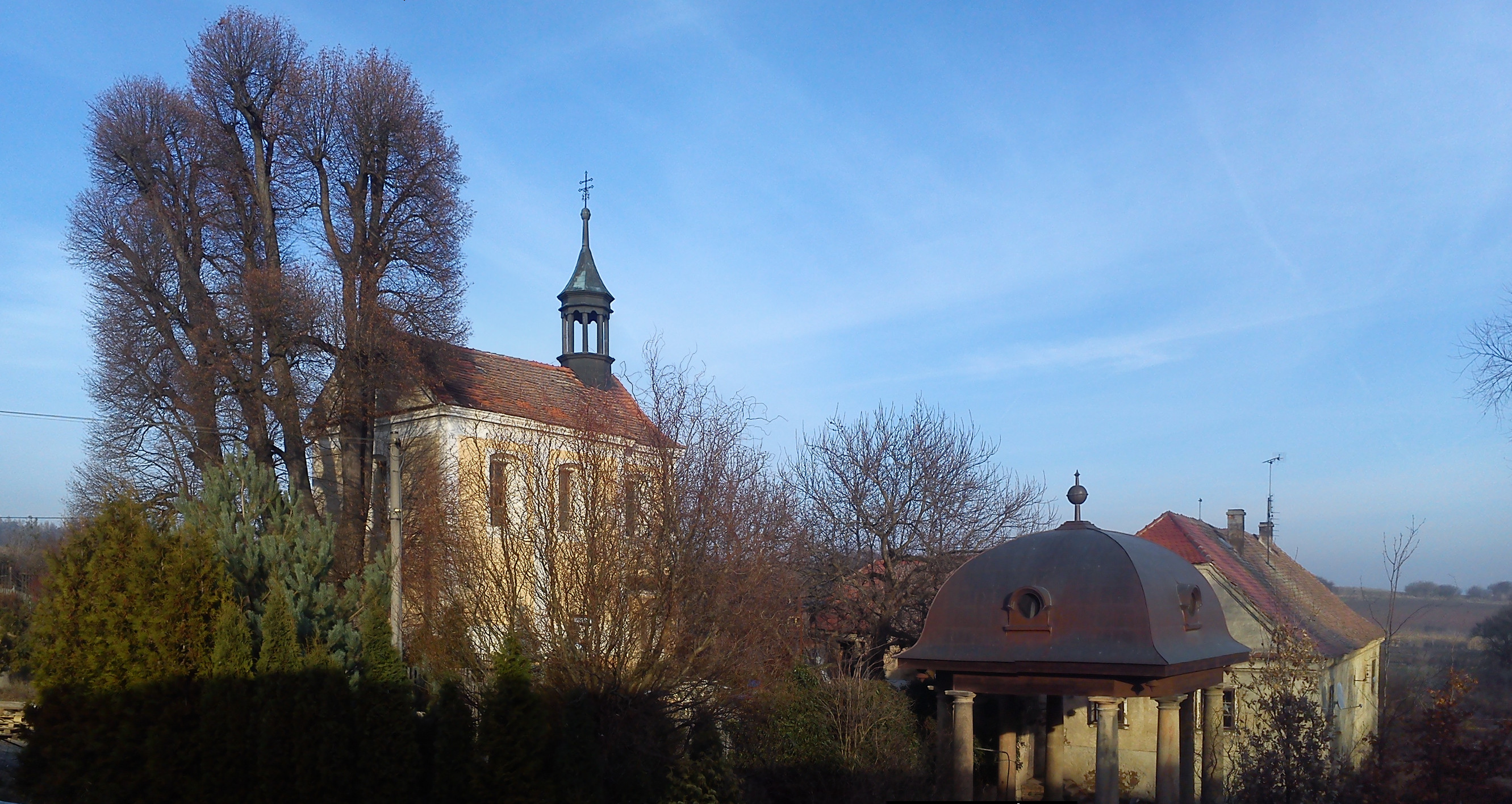 Samota s kostelem svatého Blažeje Žerotín a s Blažejskou studánkou od jihu